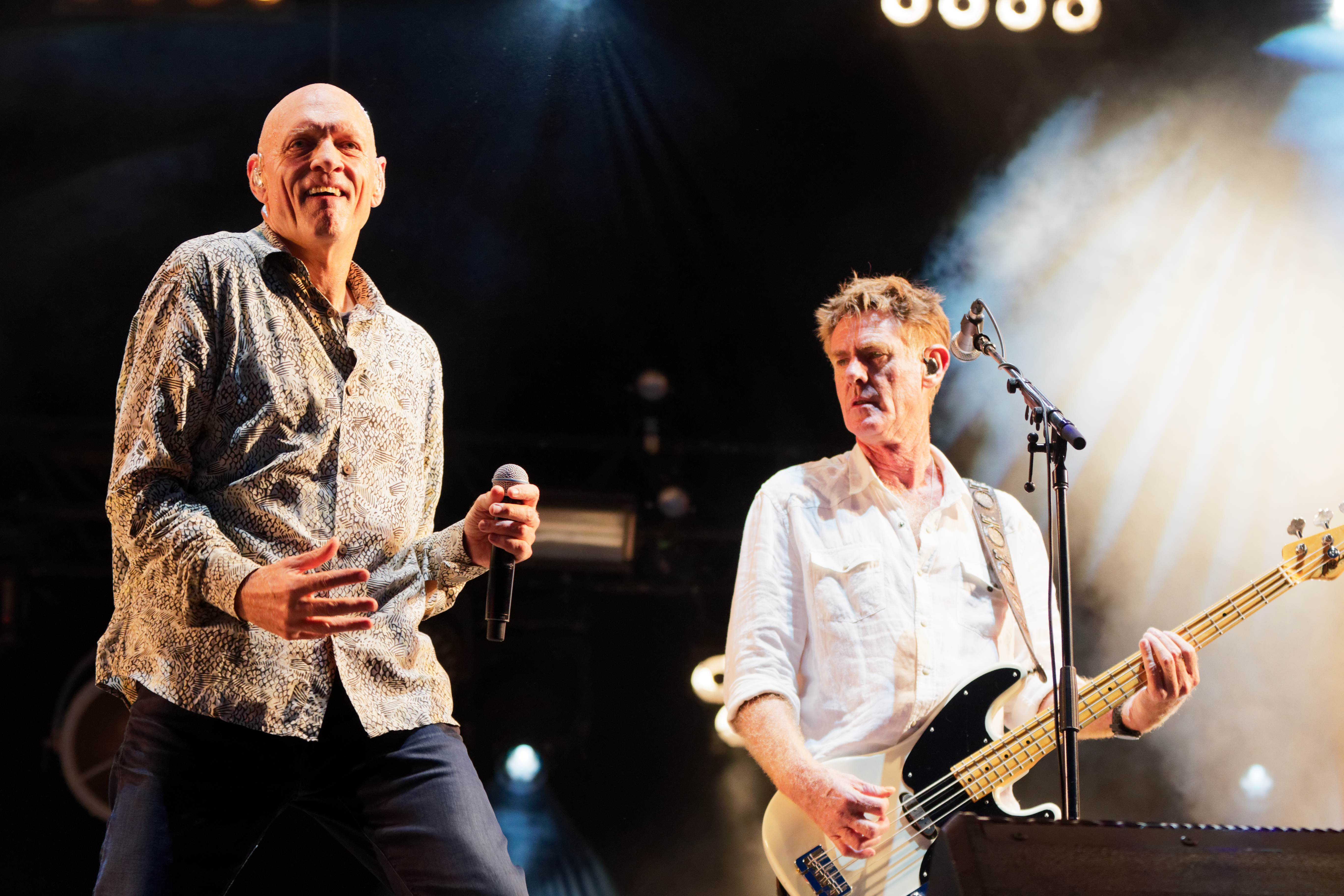 Midnight Oil en concert lors du festival des vieilles charrues 2017.